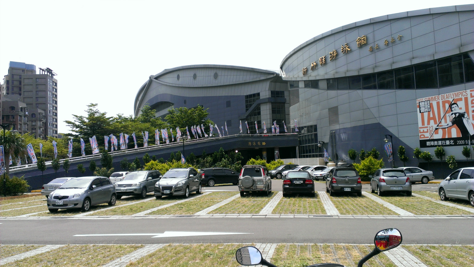 中文（台灣）: 新竹縣立體育館旁的新竹縣游泳館。